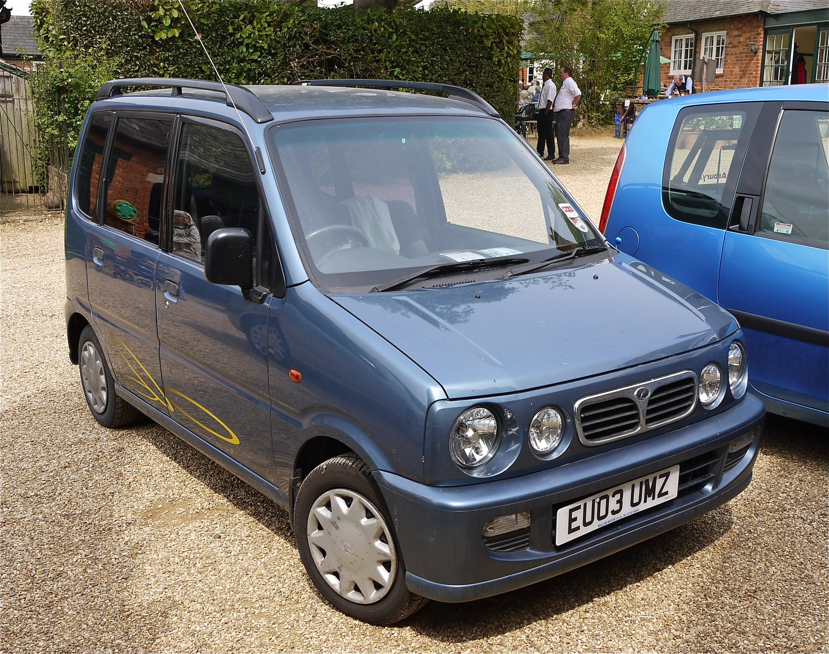 Panasonic G1 14-45 Lens